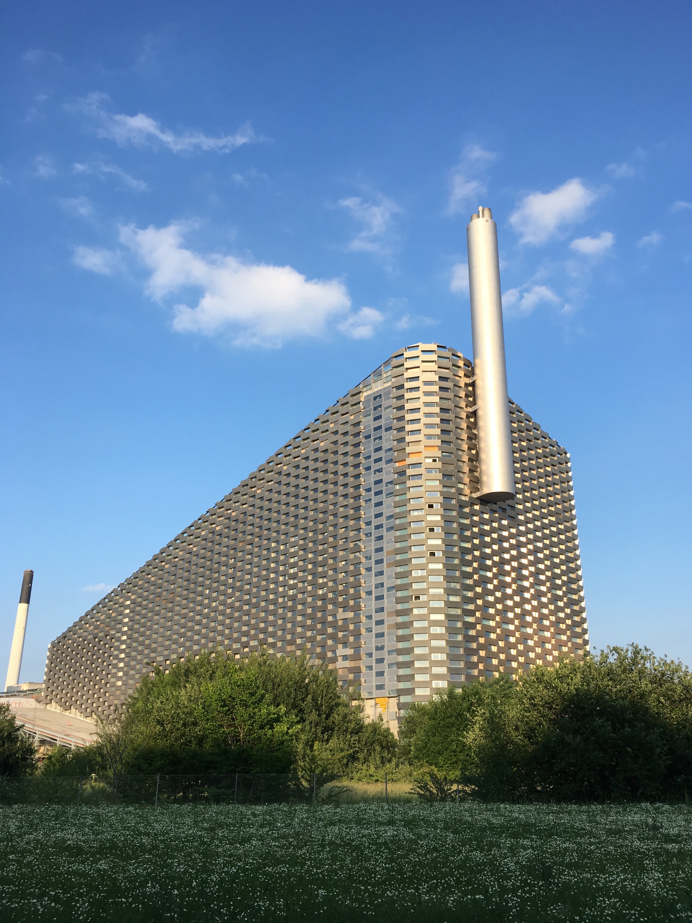 Amager Bakke ved Vindmøllevej, Amager ved København